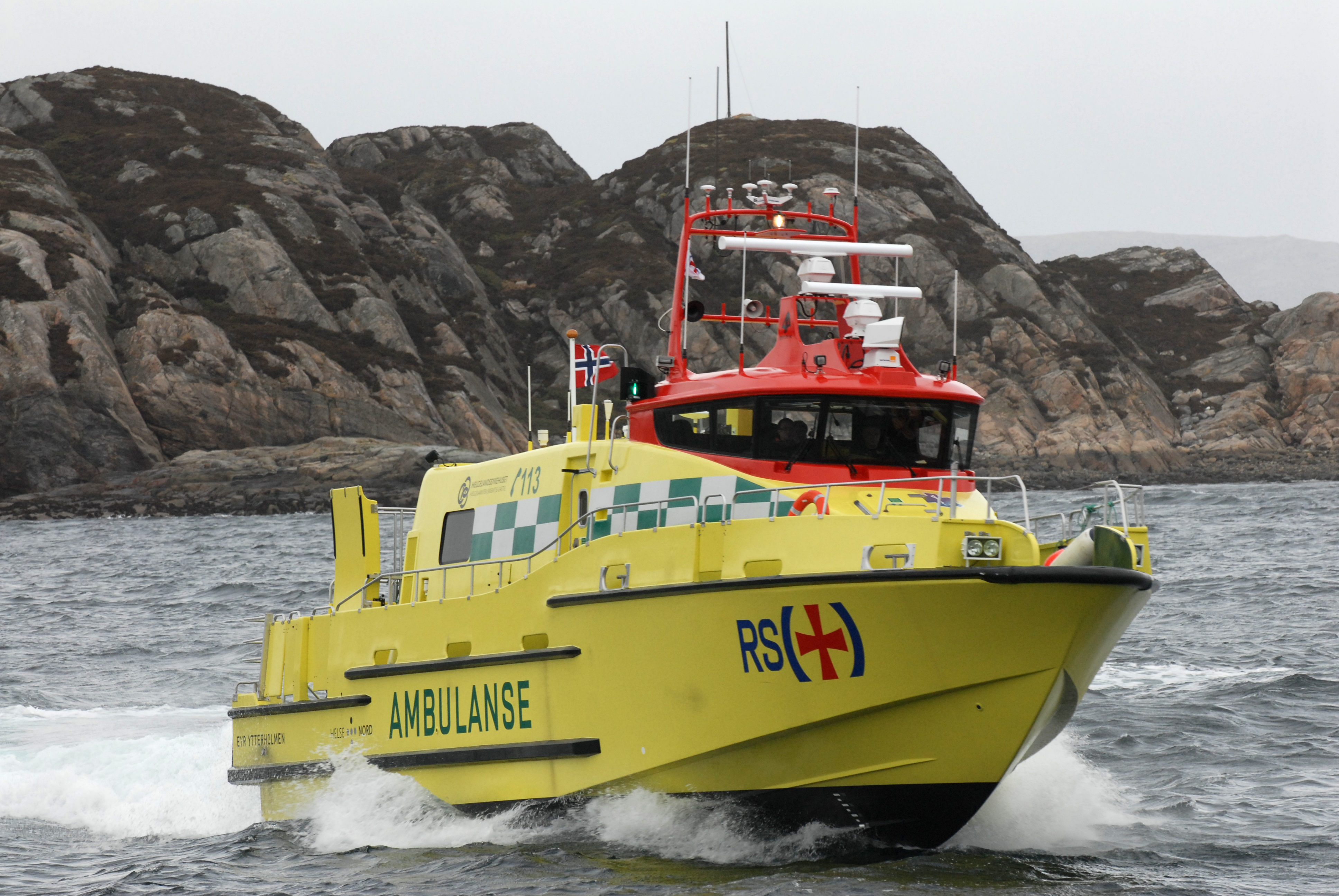 Eyr Ytterholmens transportseilas fra Hyen til Helgeland. Foto: Johan J. Petersen